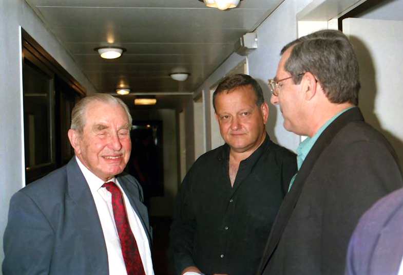 מוטי קירשנבאום הנשיא חיים הרצוג ודן שילון בהקלטת תכנית טלוויזיה